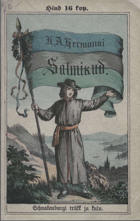 Luuleraamatu esikaas